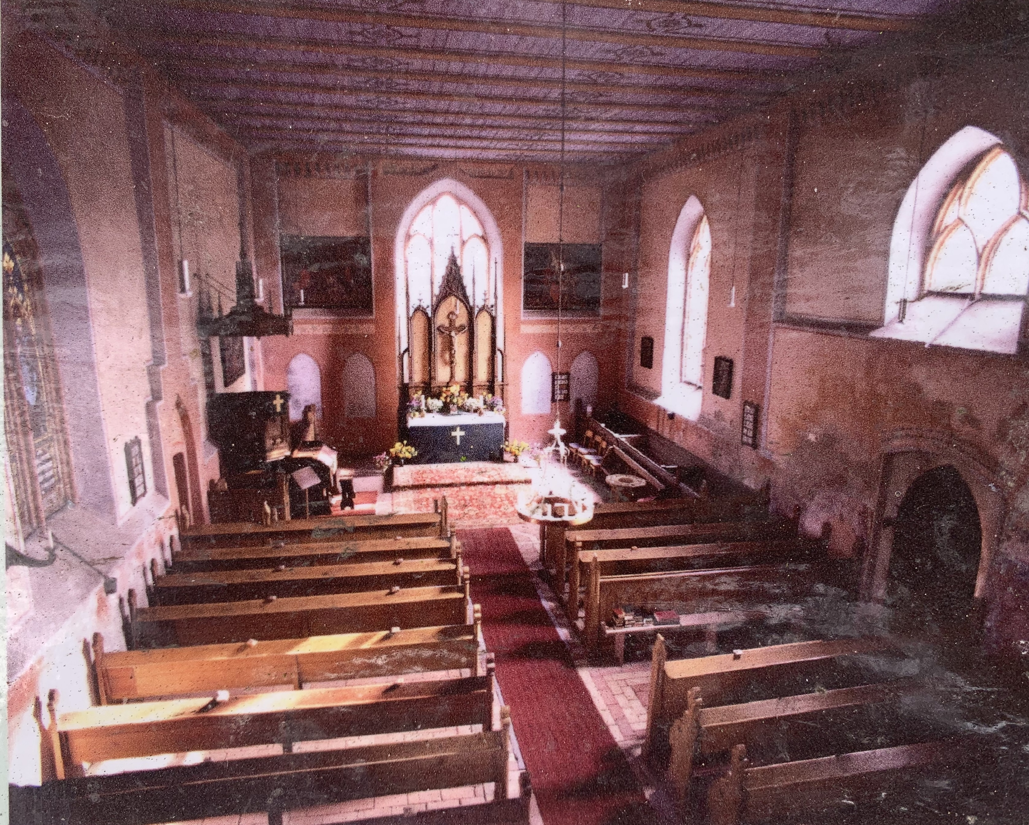 Aufnahme auf einer öffentlich zugänglichen Informationstafel des Naturparks Nossentiner/Schwinzer Heide, aufgestellt östlich der Kirche: Die Kirche Linstow ist eine Backsteinsaalkirche in Dobbin-Linstow im Landkreis Rostock in Mecklenburg-Vorpommern. Im Innern steht eine neugotische Holzausstattung aus dem Jahr 1871.